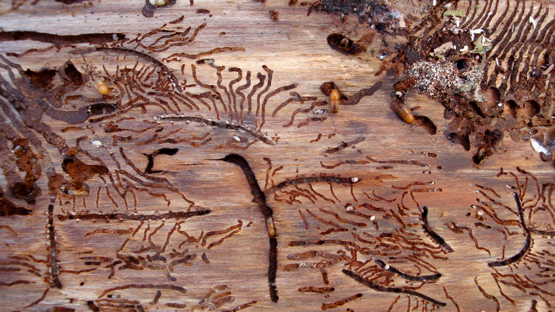 Mehrere Borkenkäfer in unterschiedlichen Entwicklungsstadien nach Entfernung der Rinde einer Fichte.